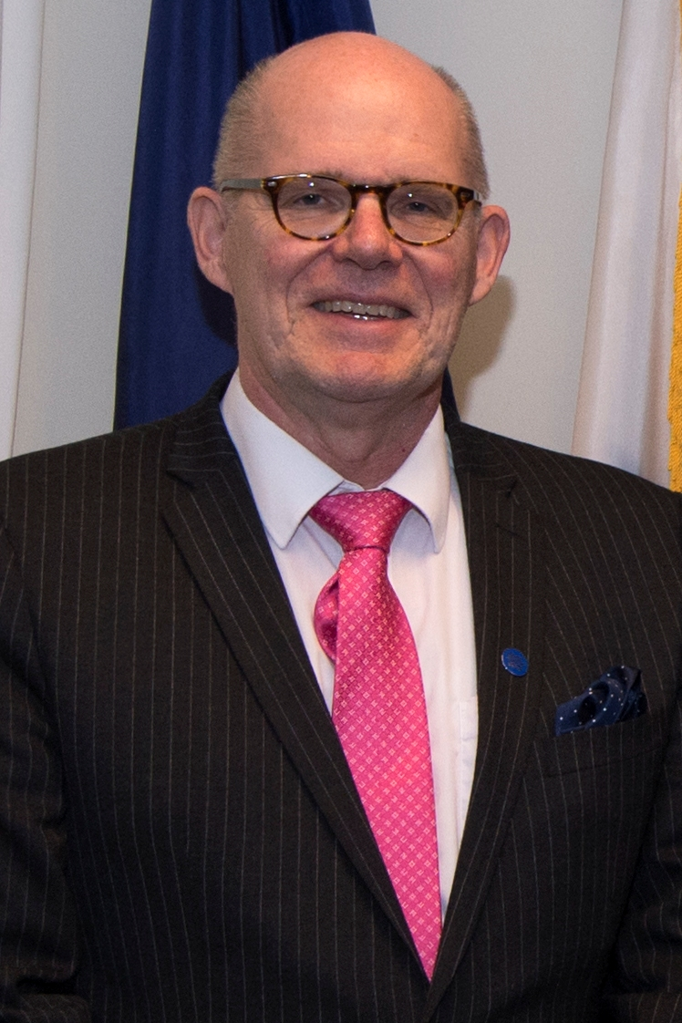 Jukka Matti Juusti